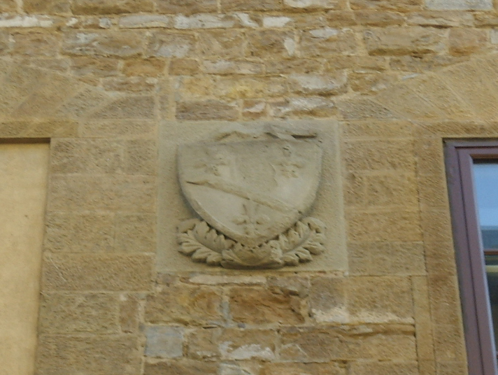 Palazzo peruzzi, stemma bourbon del monte santa maria